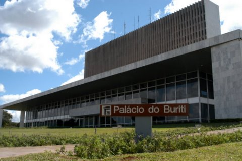 Vista frontal do Palácio do Buriti em Brasília, Sede do Governo do Distrito Federal, Brasil.